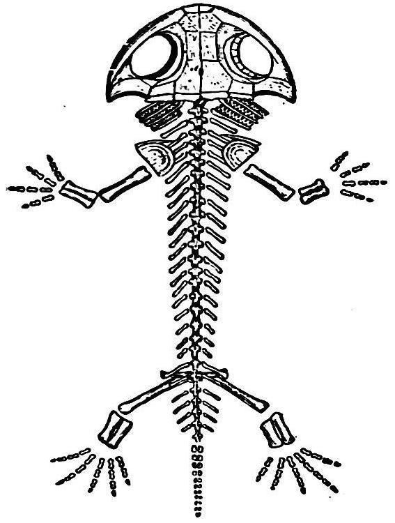 Branchiosaurus